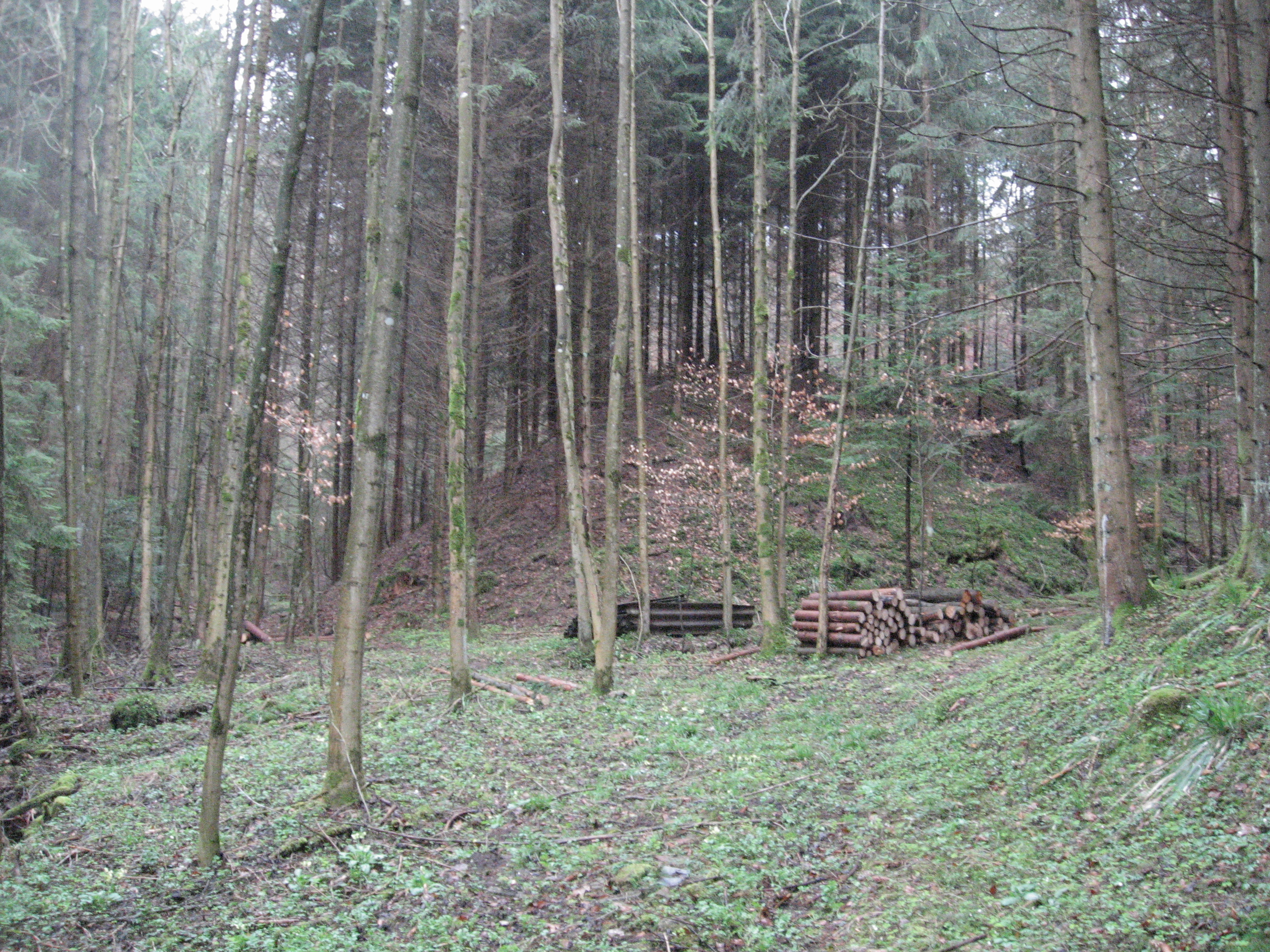 Burgstall Holenstein südlich von Bühlerzell-Holenstein. Blick auf die Nordspitze des zwischen drei und vier Meter hohen Burghügels, den im Nordosten (auf dem Bild links von hinten) der Reutebach passiert und im Westen (rechts) ein kleiner Zufluss in diesen. Das Seitentälchen hat merklich mehr Gefälle und eine Länge von nur wenigen Dutzend Metern.